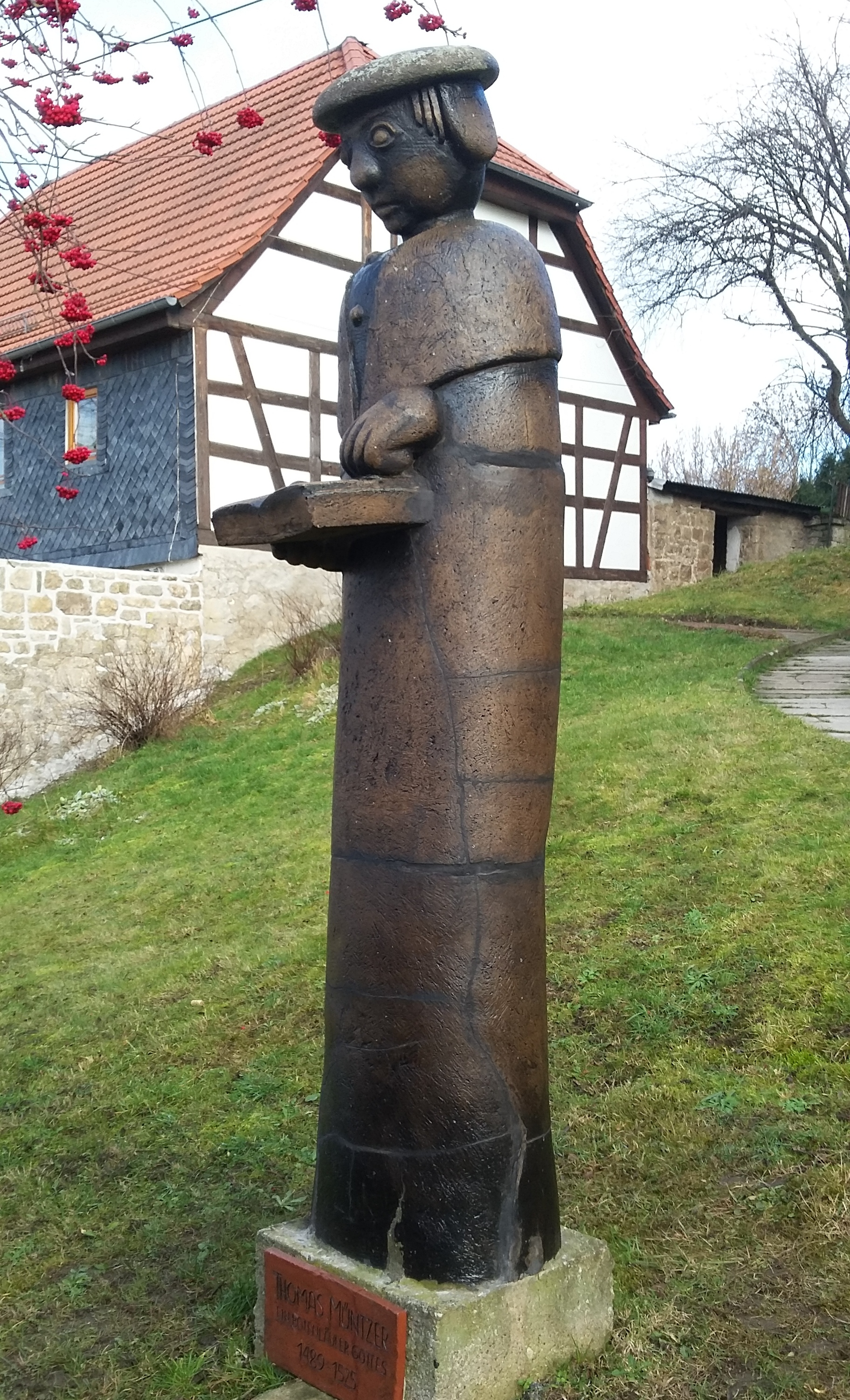 Ideenplastik vor der Kirche und dem Pfarrhaus Kapellendorf